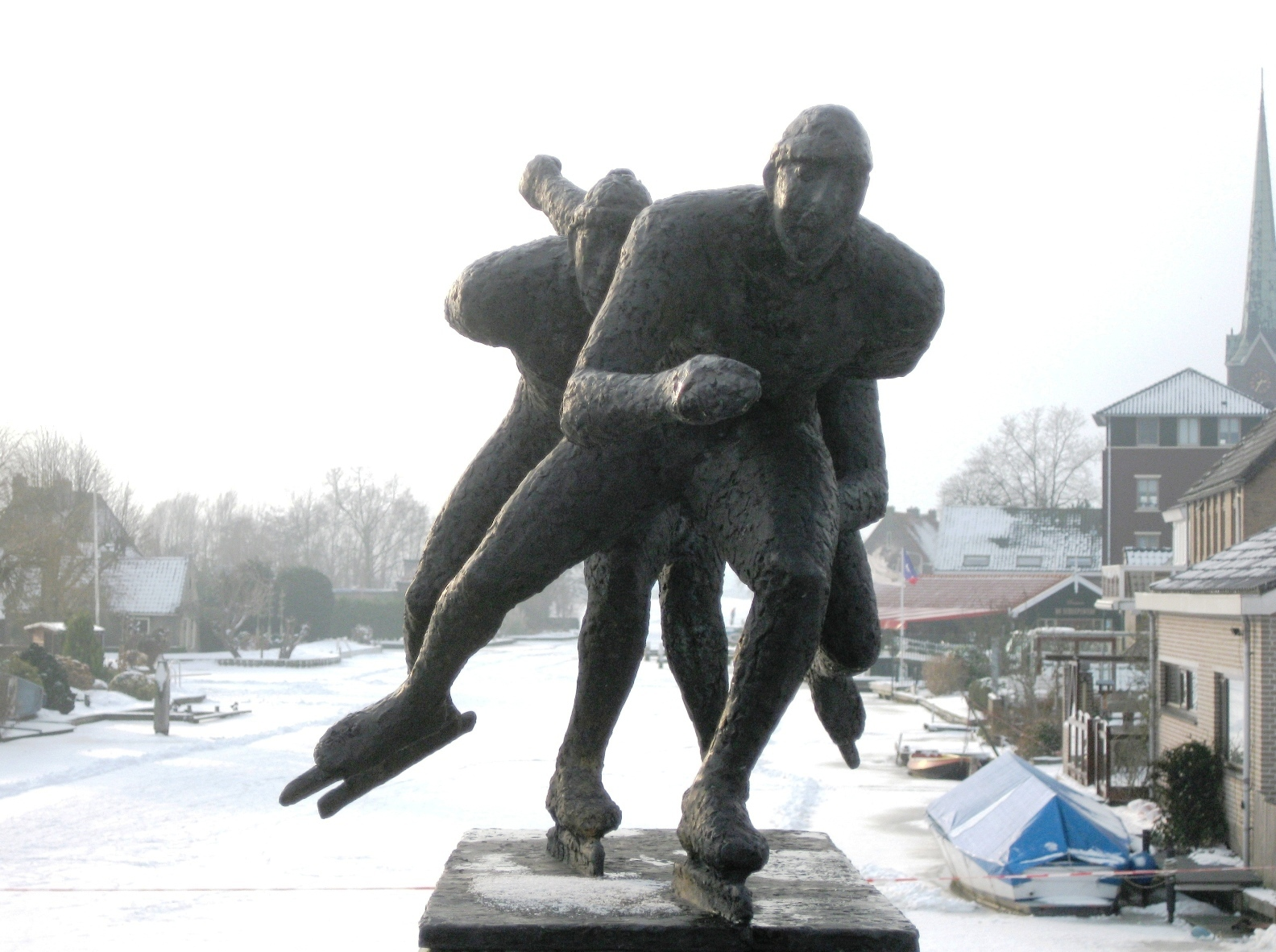 Schaatsers, brons, 100 x 120 x 60 cm. Doesbrug - Hoogmade